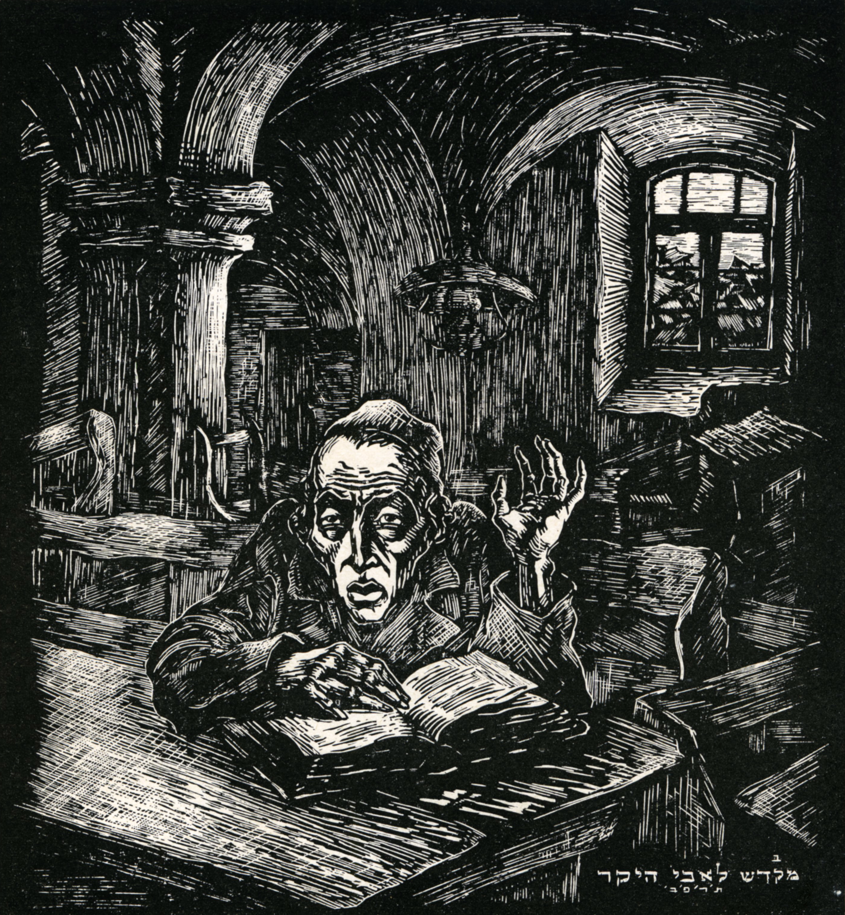 Print